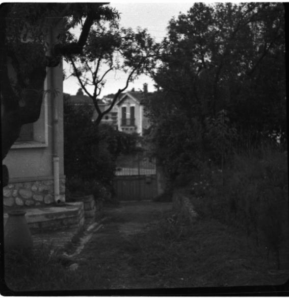 une photo faite avec l'alsaflex (circa 1963) Photo par Jean-Daniel Dodin